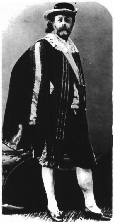 Albert Bierstadt vestido como Carlos I da Inglaterra para um baile de gala